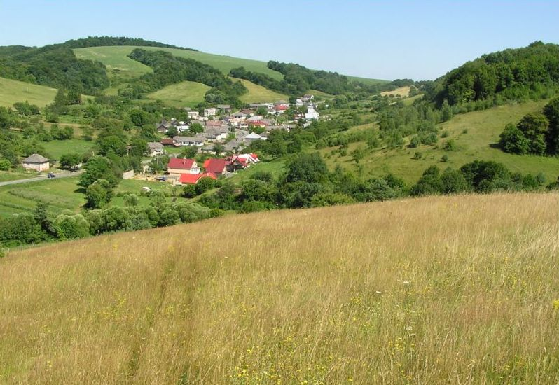 DescriptionCelkový pohľadDate25 June 2006SourceOwn workAuthorAndrej BelovežčíkPermission (Reusing this file) anoCelkový pohľad